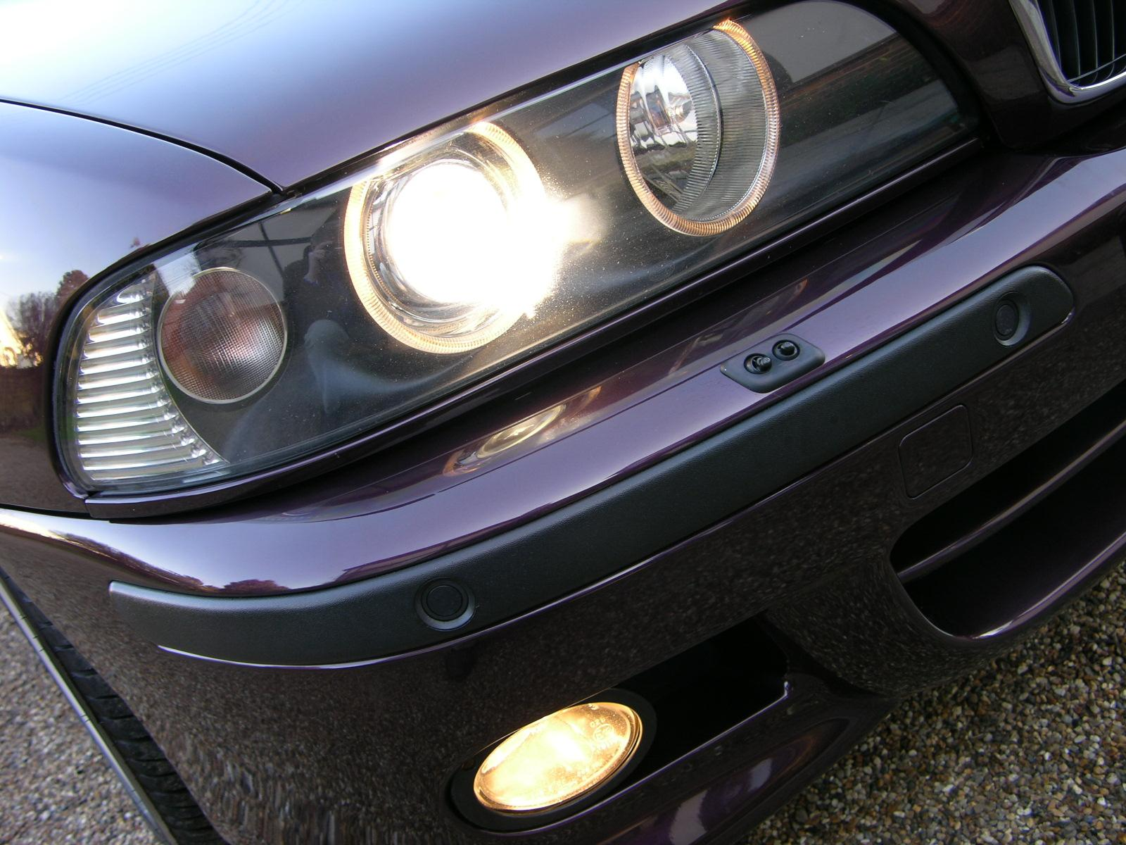 BMW 530i Sport Individual